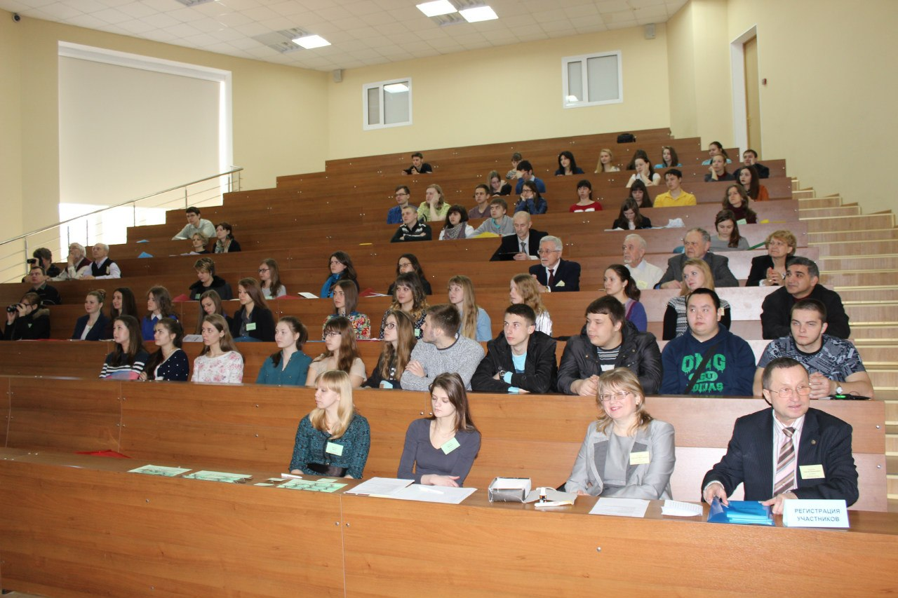 Giang Duong